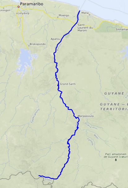 carte réalisée sur umap This map may be incomplete, and may contain errors. Don't rely solely on it for navigation.